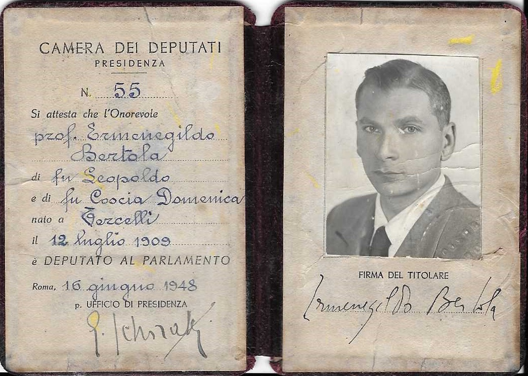 Senatore, insegnante e politico italiano (1909-2000) tesserino